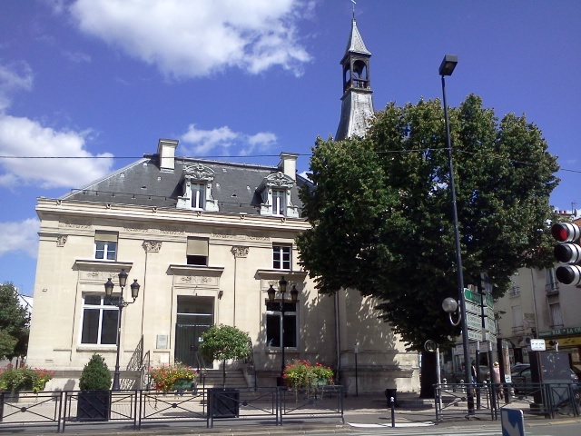 L'ancienne mairie de Champigny sur Marne